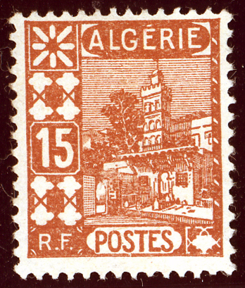 Timbre de l'Algérie française, 15 c brun-jaune, émission de 1926. Modèle de couleur pour Yvert (N°39)